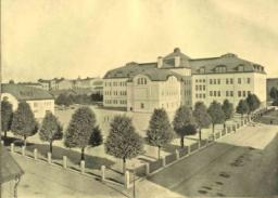 Fasad mot gården år 1914